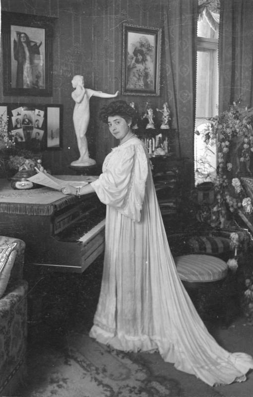 Fritzi Massary Fritz Massary wurde für eine Gage von über 60 000 Mark an das Berliner Metropoltheater zurückangagiert [Fritzi Massary an einem Flügel] Abgebildete Personen: Massary, Fritzi: Operettensängerin, Österreich (PND 118731572)